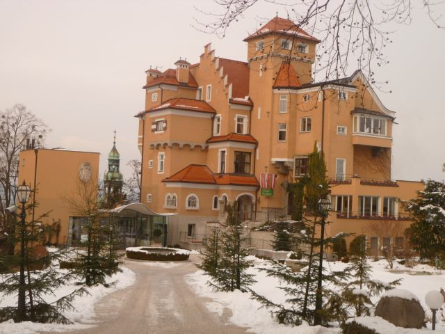 Schloss Mönchstein